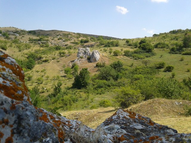 Monte Serrone a Sperone